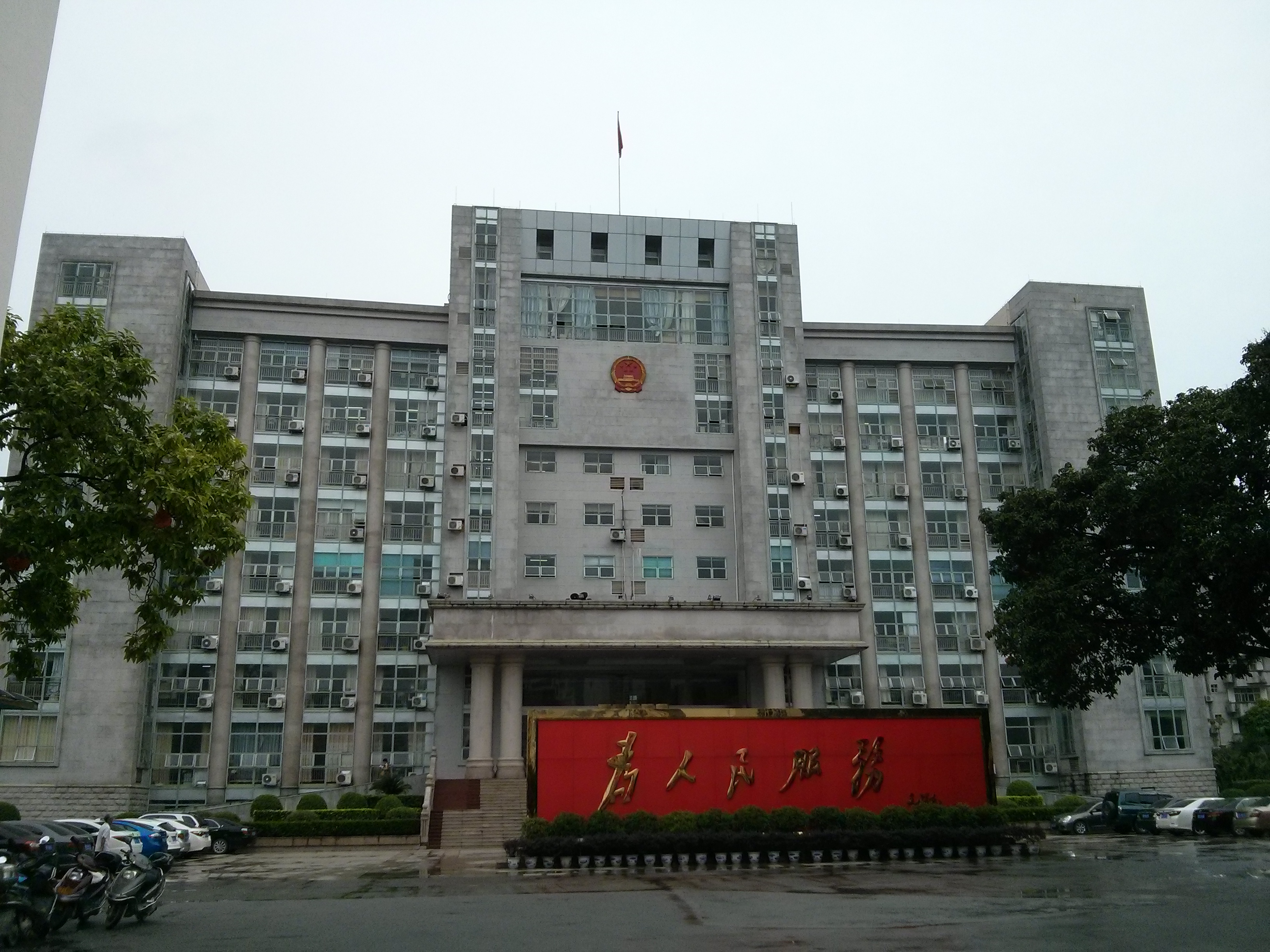 中文（中国大陆）: 广西省河池市都安县政府